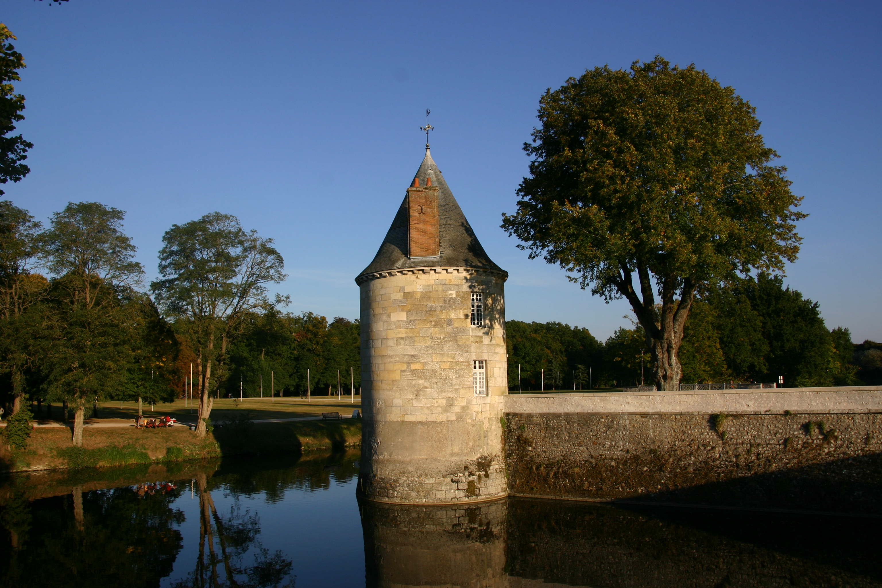 Schloss Sully-sur-Loire